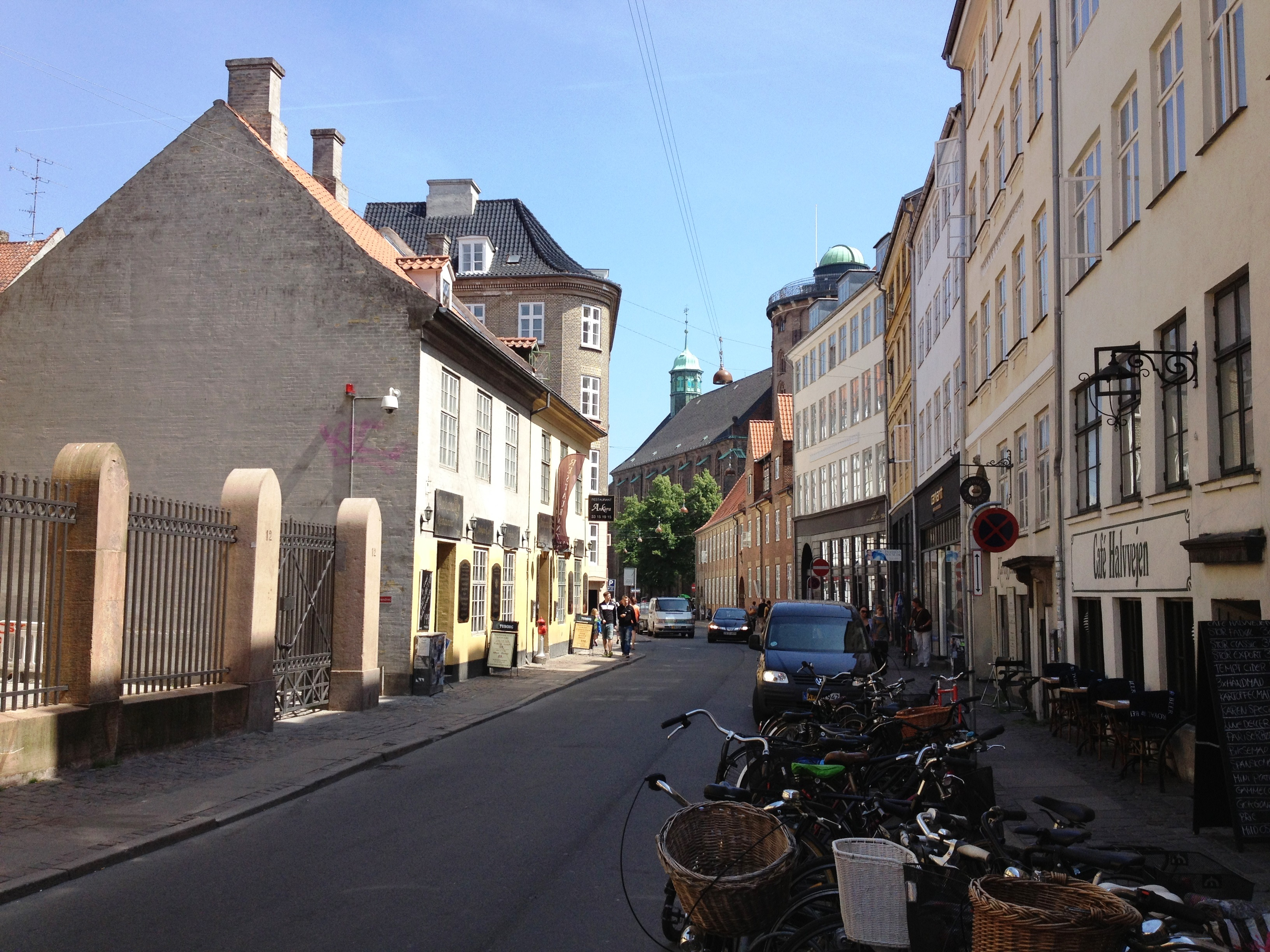 Krystalgade in Copenhagen, Denmark